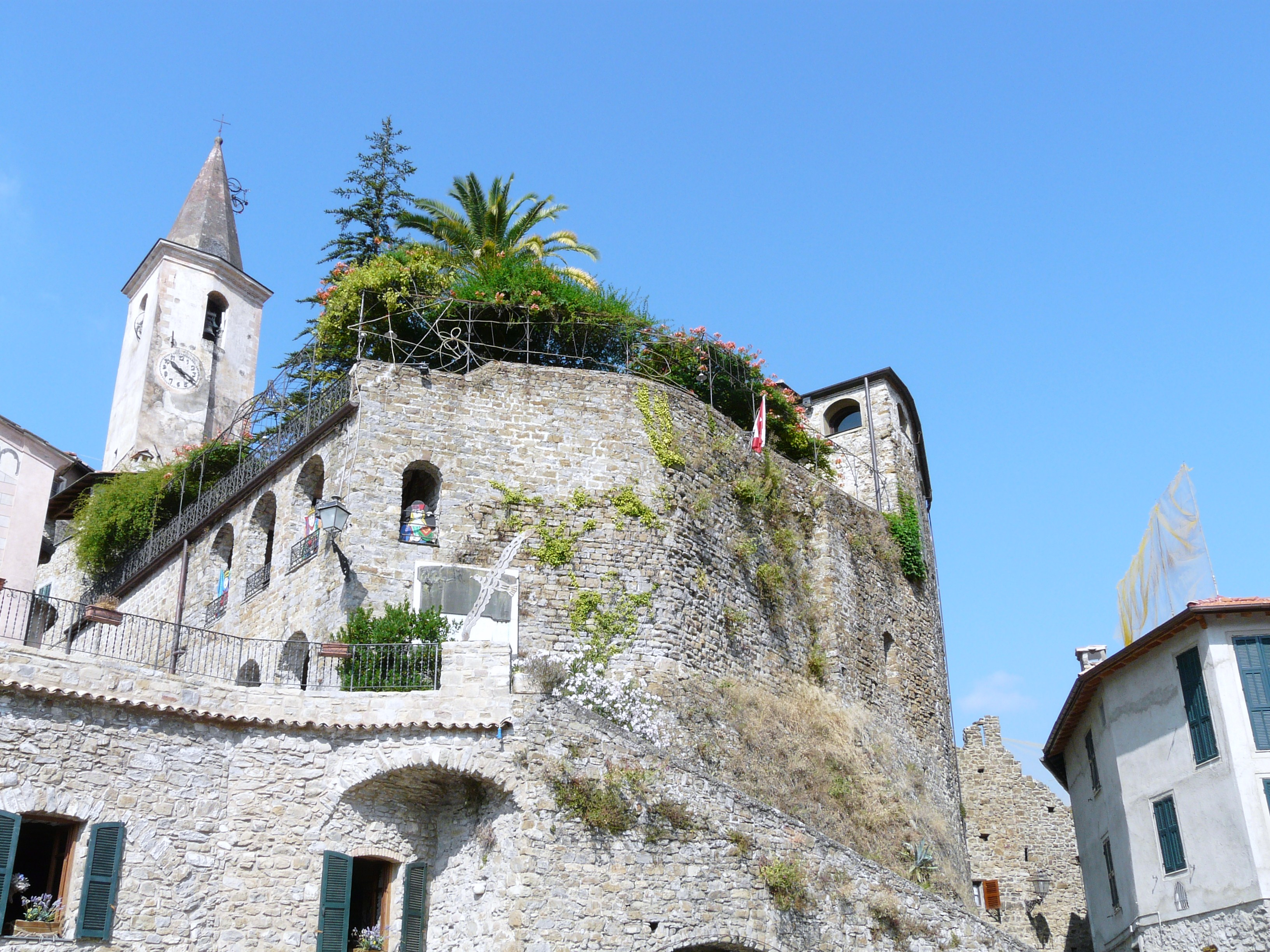 Castello della Lucertola, Apricale, Liguria, Italia